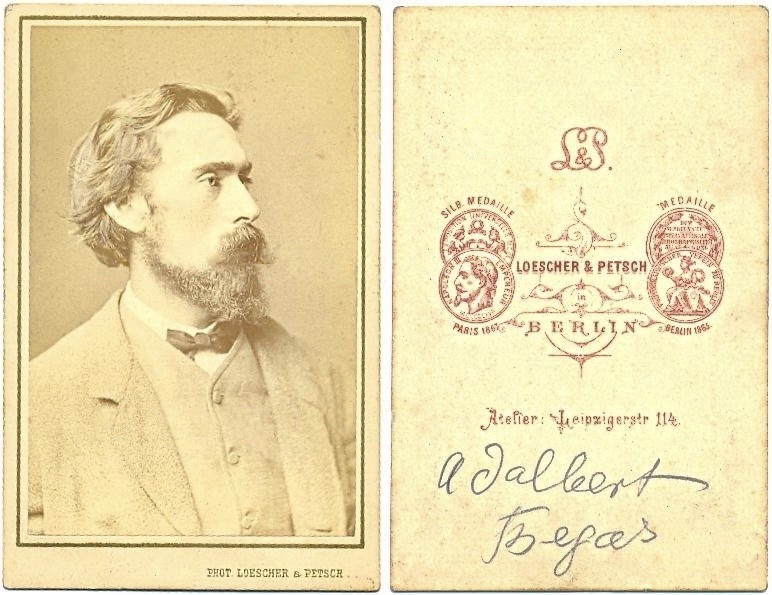 Adalbert Begas; Kabinettfoto